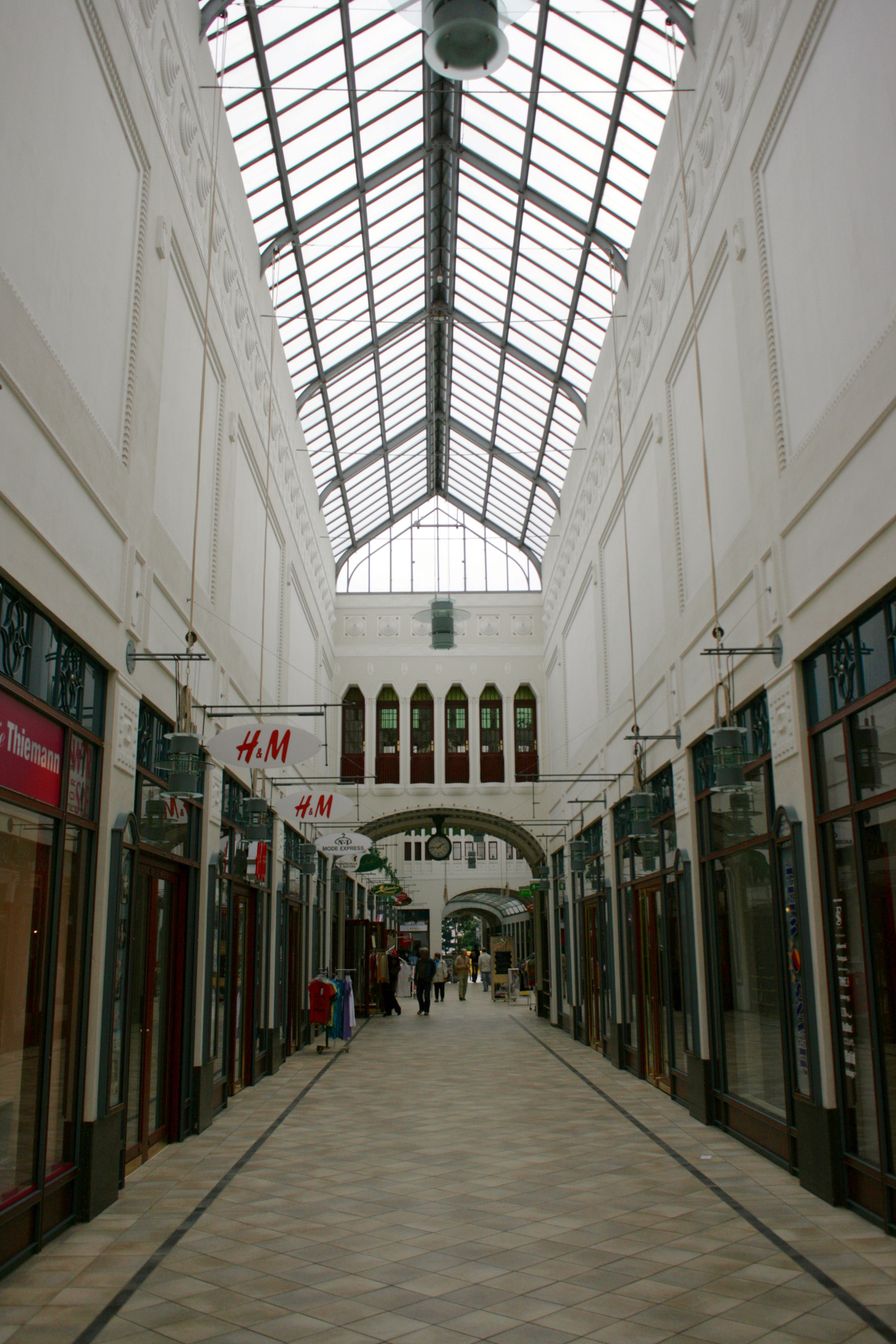 Straßburgpassage in Görlitz